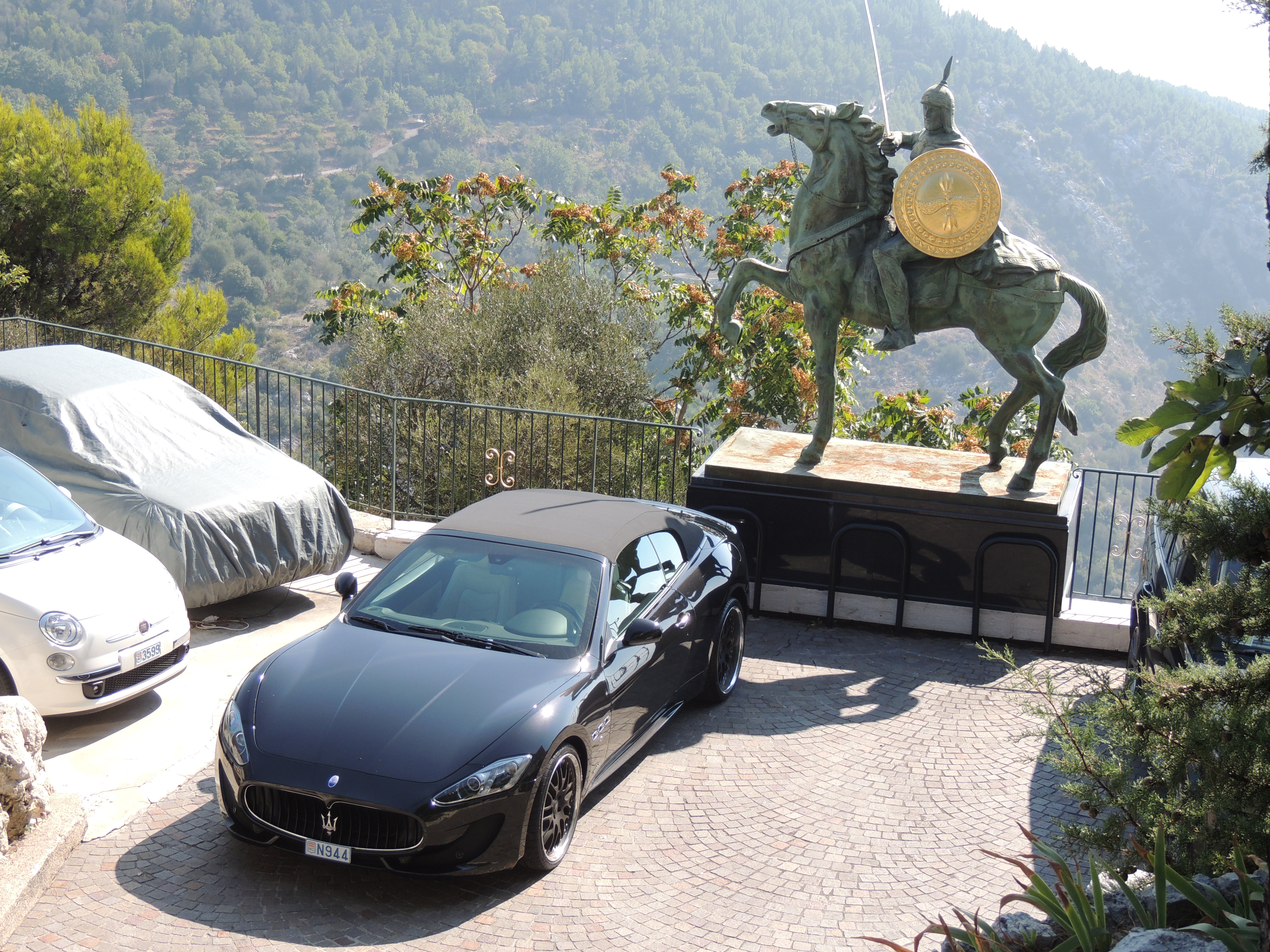 chevalier de la chèvre d'or